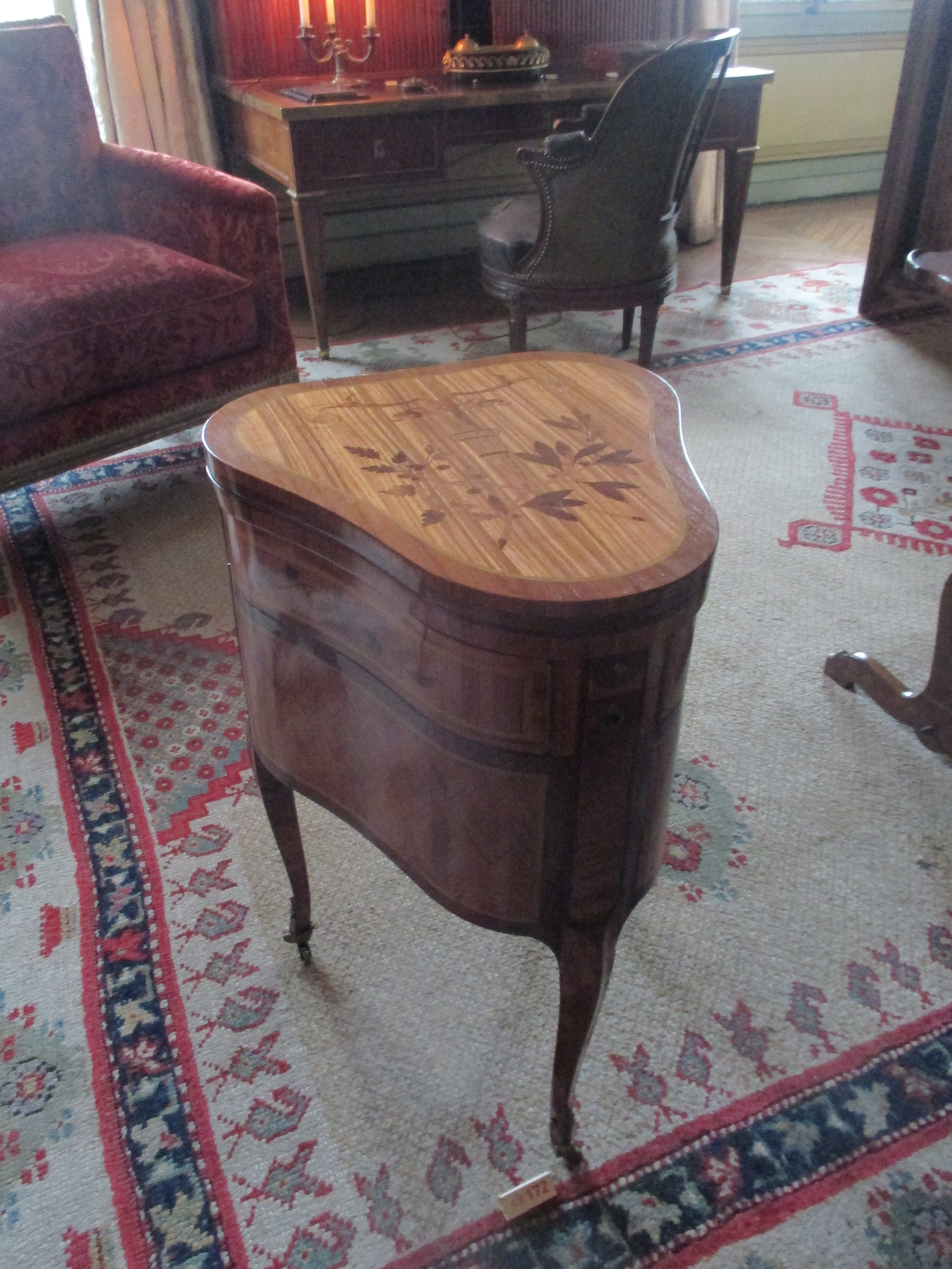 Table à toilette en forme de cœur (vers 1775), estampille de Charles Topino. Musée Nissim-de-Camondo (Paris).